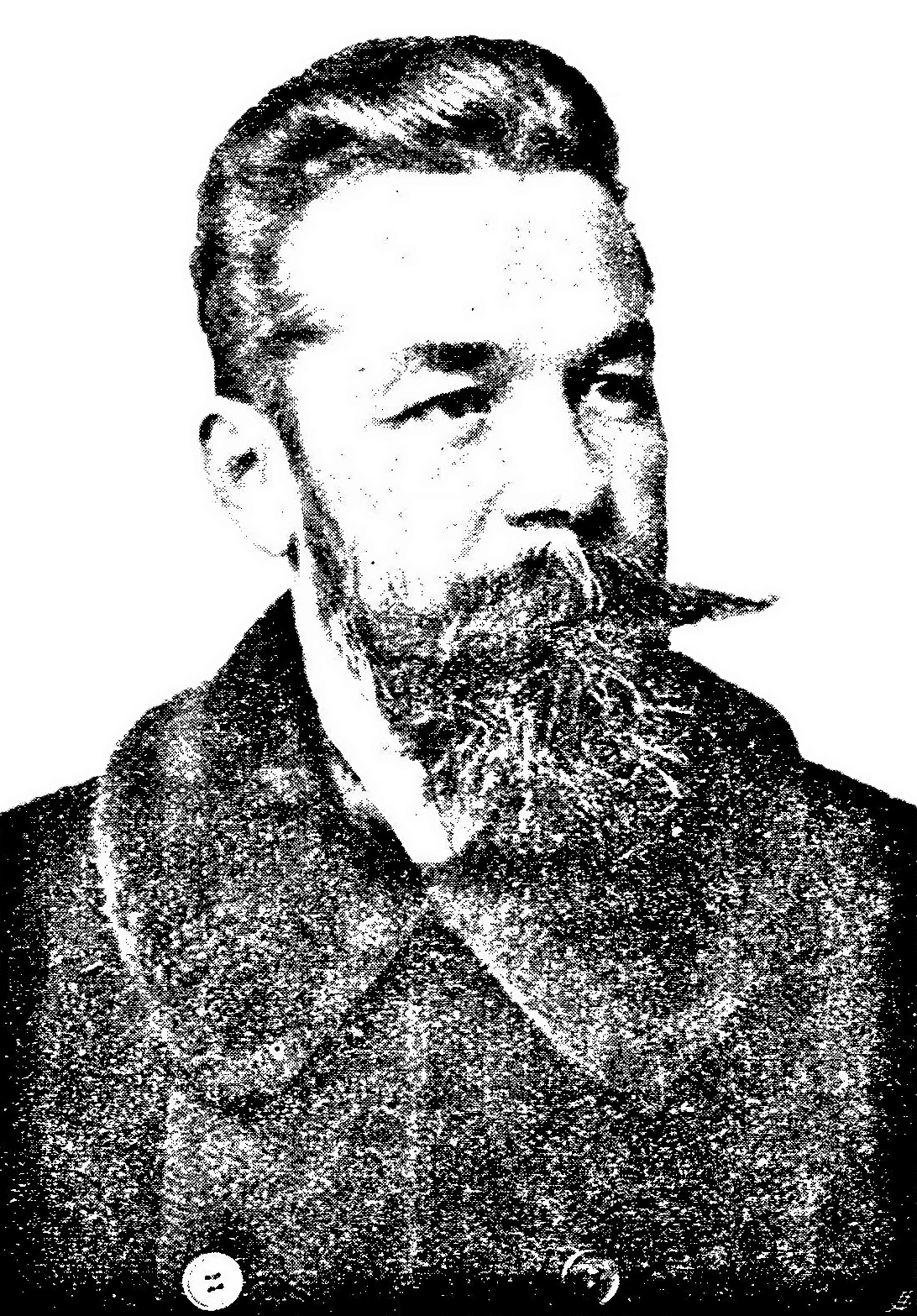 Aurelius Polzer (1848-1924), österreichischer deutschnationaler Dichter und Schriftsteller